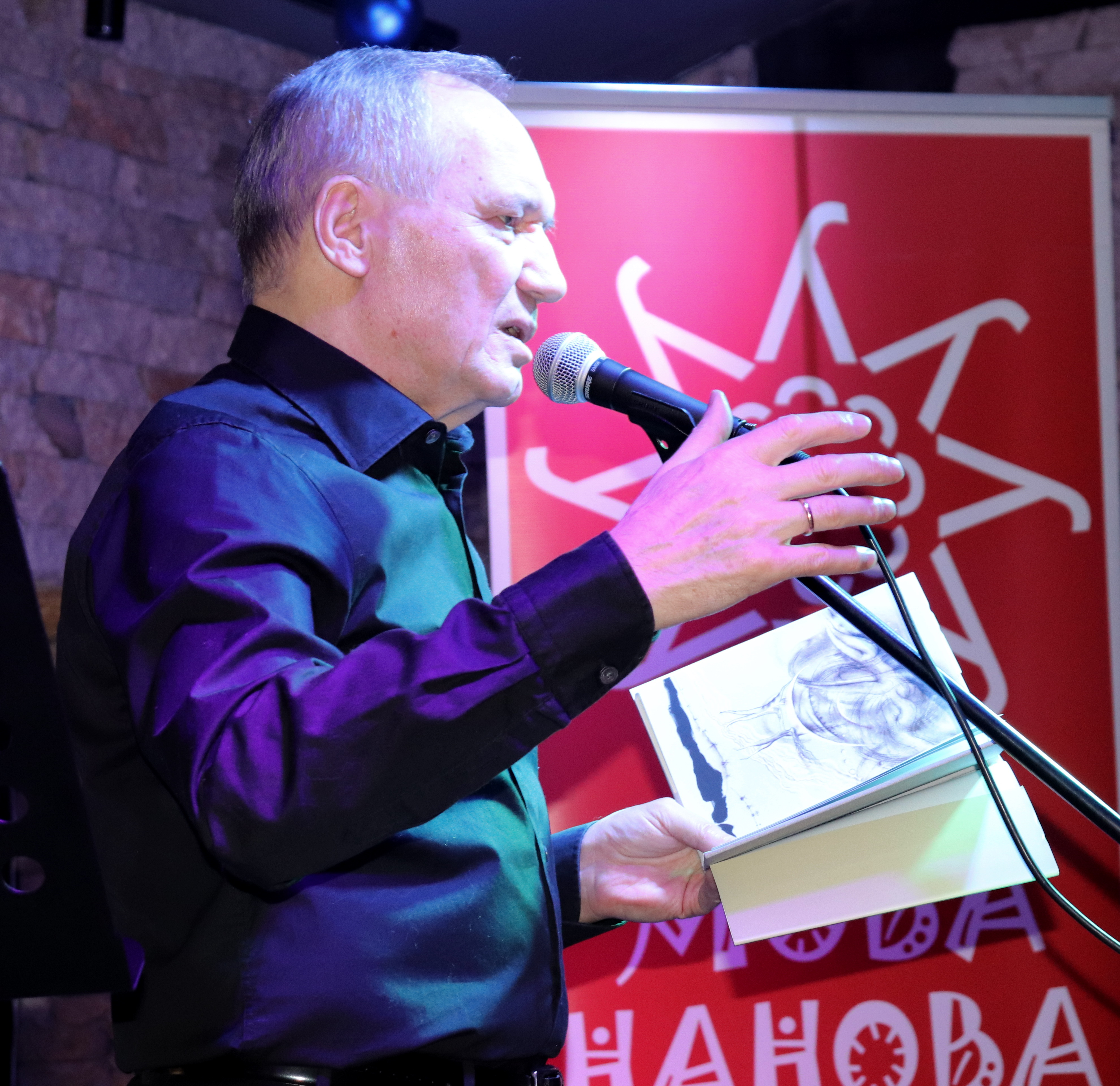 Уладзімір Някляеў падчас прэзентацыі сваёй кнігі «Знічы кахання»